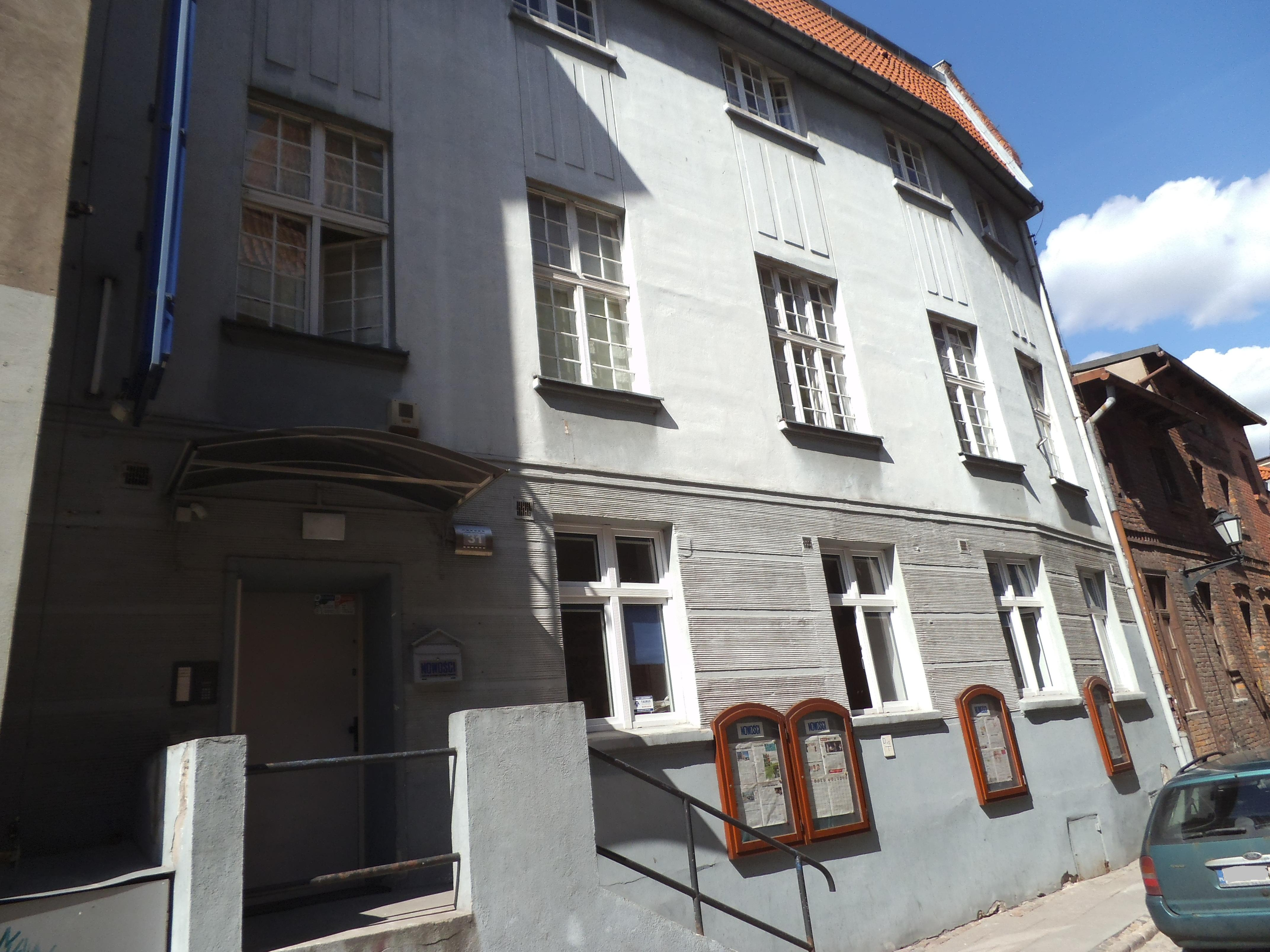 redakcje gazety - Nowości w Toruniu